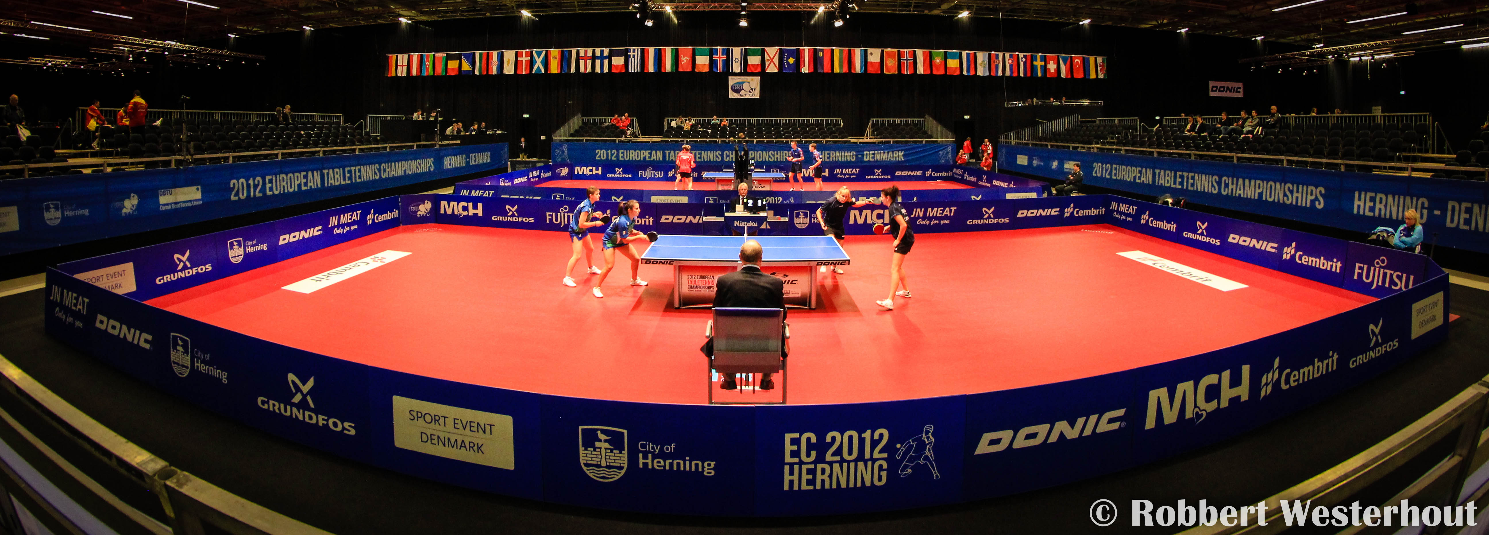 Dansk BordTennis Union, Herning, Denmark